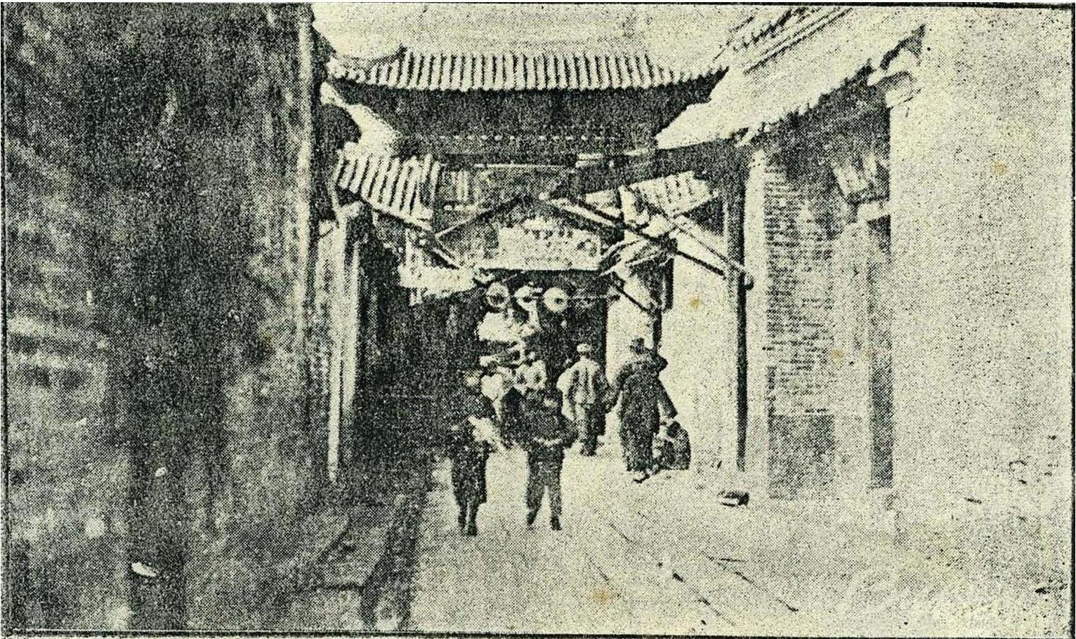 清朝宣统年间的新会城知政门（今知政南路）